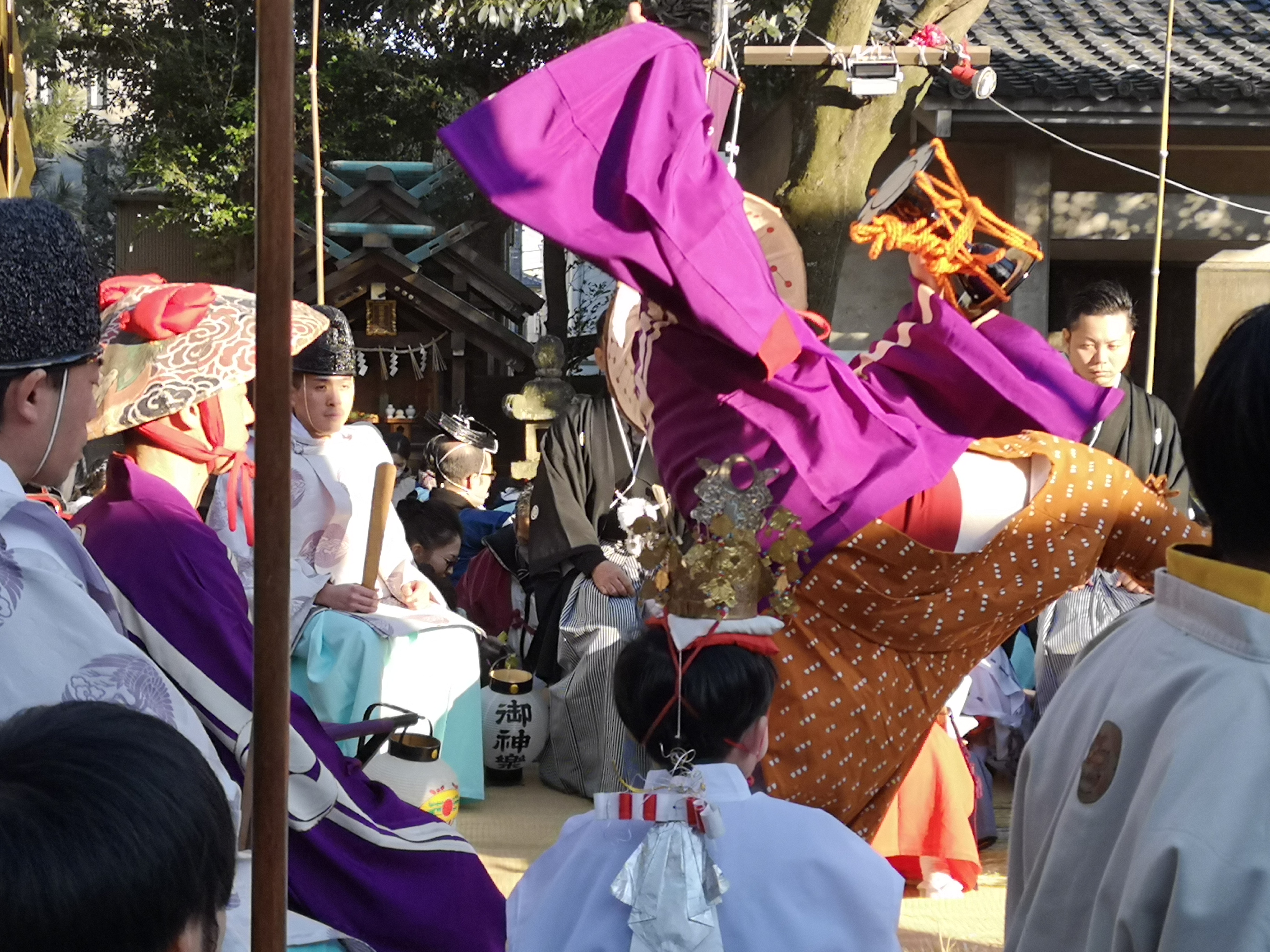 愛知県豊橋市の安久美神戸神明社の例祭「鬼祭」の司天師の「チンバ踊り」